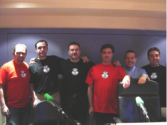 Imagen del programa La Rosa de los Vientos